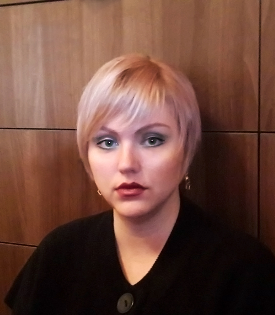 Srpskohrvatski / српскохрватски: Milica Vucurovic